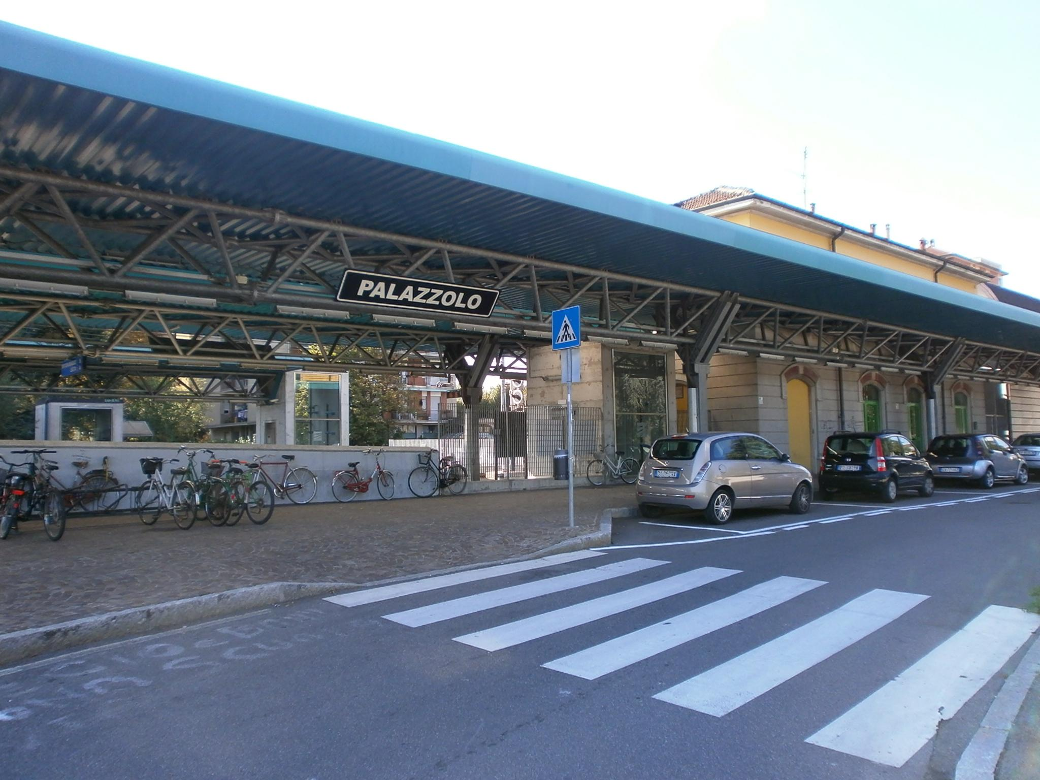 Stazione delle ferrovie Nord di Palazzolo Milanese - 03